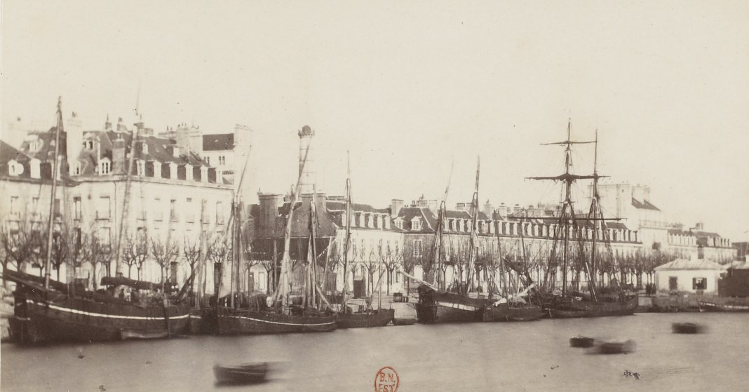 Lorient en 1866, Quai